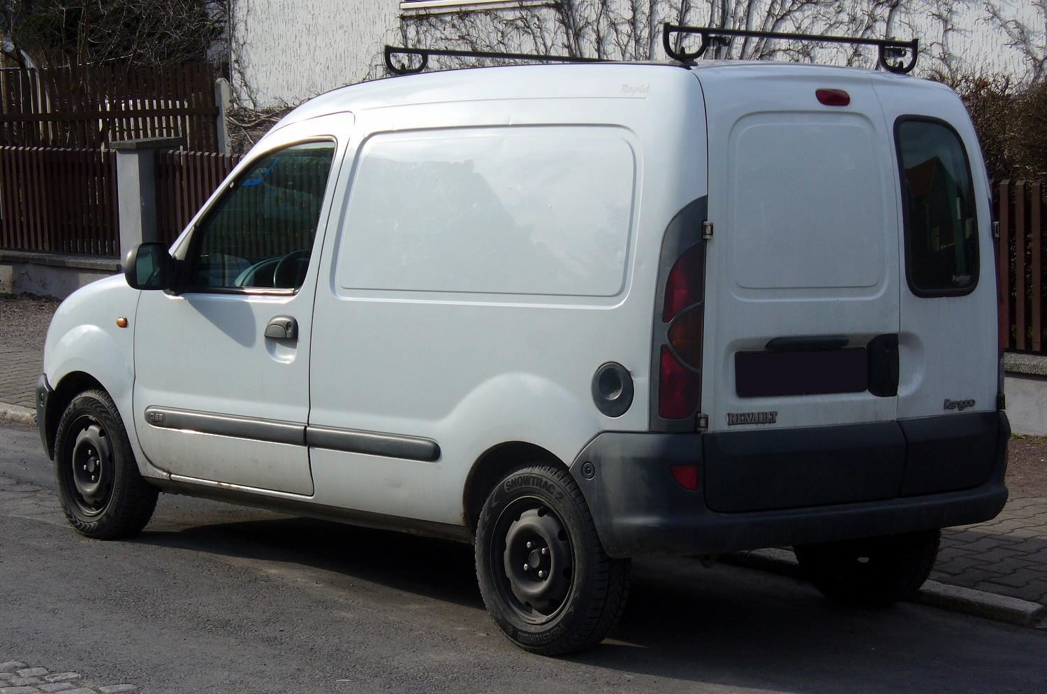 Renault Kangoo Rapid I